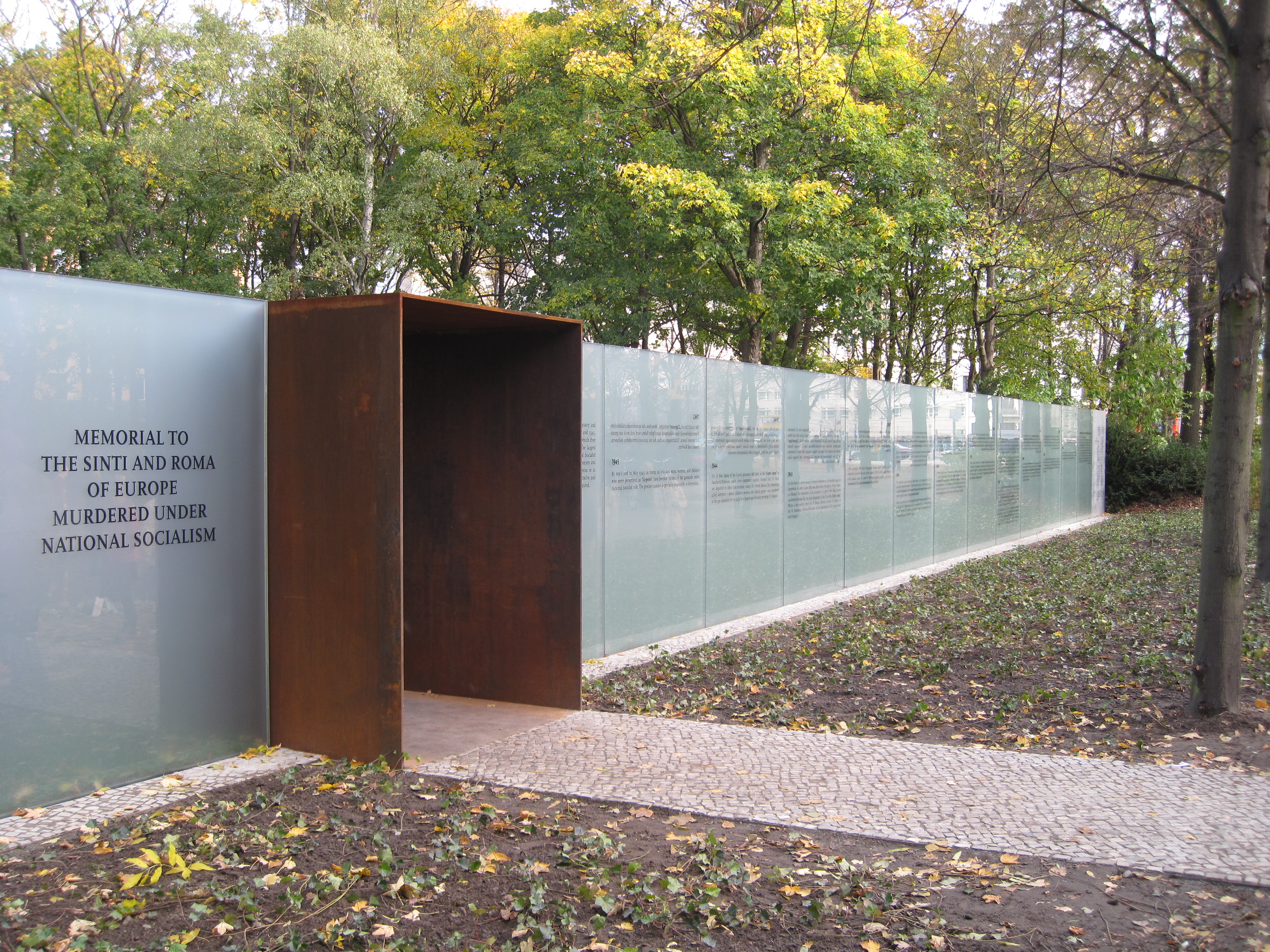 Gedenkstätte Denkmal für die im Nationalsozialismus ermordeten Sinti und Roma Europas in Berlin-Tiergarten südlich des Reichstagsgebäudes.